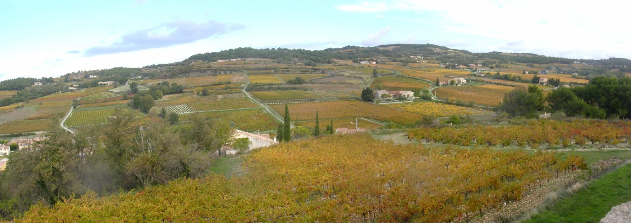 Vue sur le vignoble de Cairanne (France)